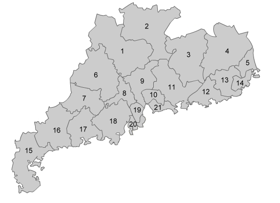 A Blank Guangdong Map